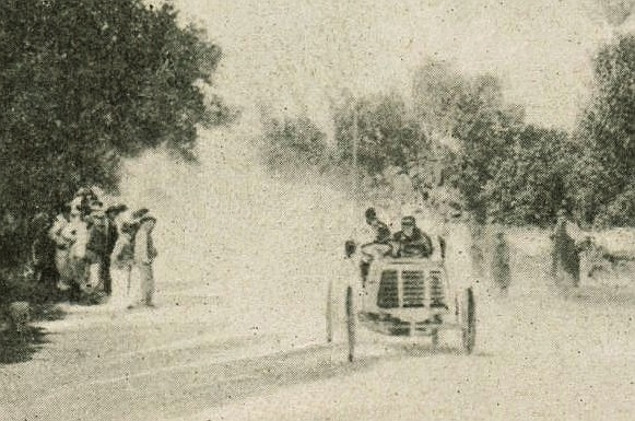 La Vie au Grand Air, 27 septembre 1902